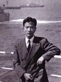 中文（中国大陆）: 王希季在归国的客轮上